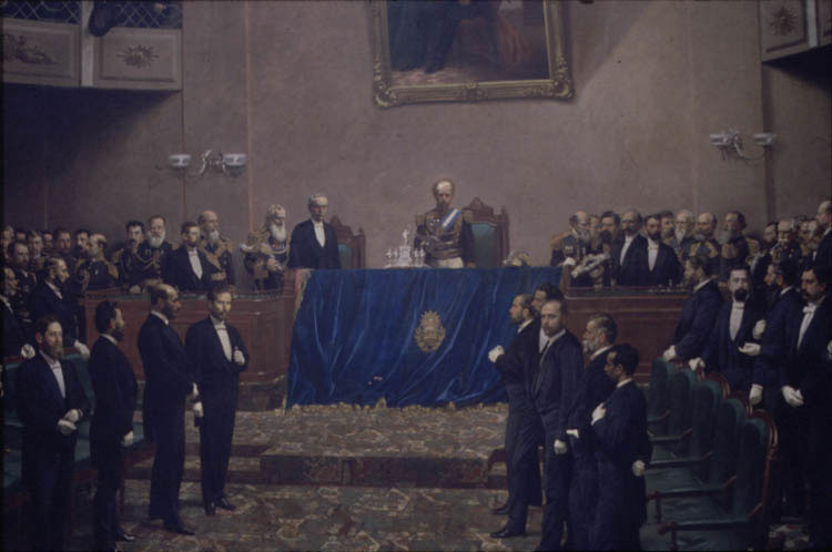 "El presidente Julio Argentino Roca inaugura el período legislativo del año 1886" del pintor de Uruguay Juan Manuel Blanes (1830 - 1901). Óleo exhibido en el "Salón de los Pasos Perdidos del Palacio del Congreso Nacional" de Argentina.